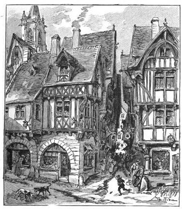 Illustration tirée de Histoire de France, cours élémentaire, Ernest Lavisse, Armand Colin, 1913, page 43 de l'éditon Heath de 1919.